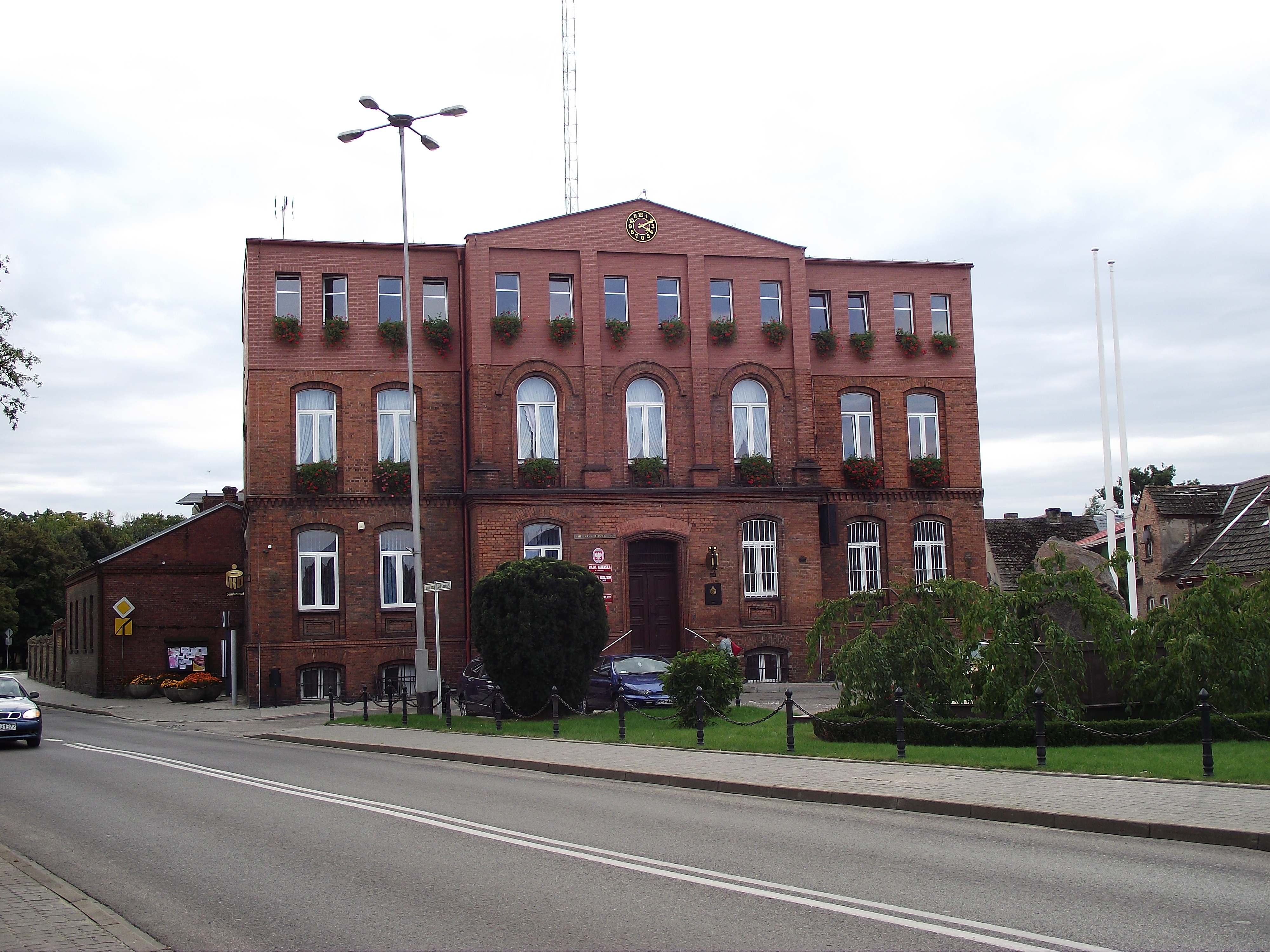 Wieleń - ratusz